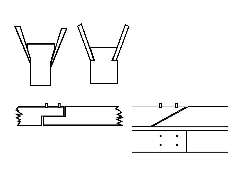 Viking ships keel. Oben: Befestigung der Spanten am Kiel; unten links: Befestigung des Stevens am Kiel (Nydam-Boot), unten rechts (Oseberg- und Gogstadt-Schiff)